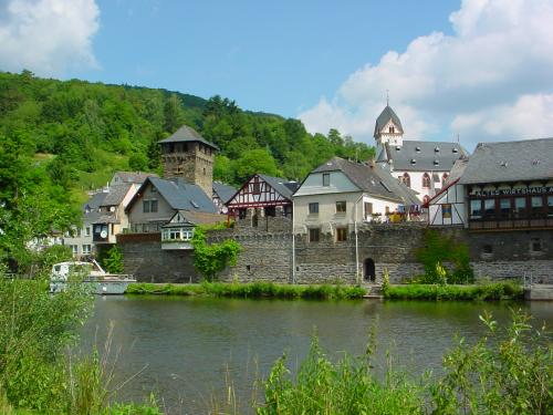 Beschreibung: Dausenau bei Bad Ems- Blick über die Lahn auf den Ort Quelle: Fotografiert Juli 2004 Fotograf: Reinhard Kraasch Copyright Status: GNU Freie Dokumentationslizenz